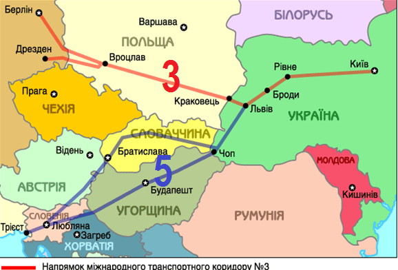 карта європейських транспортних коридорів